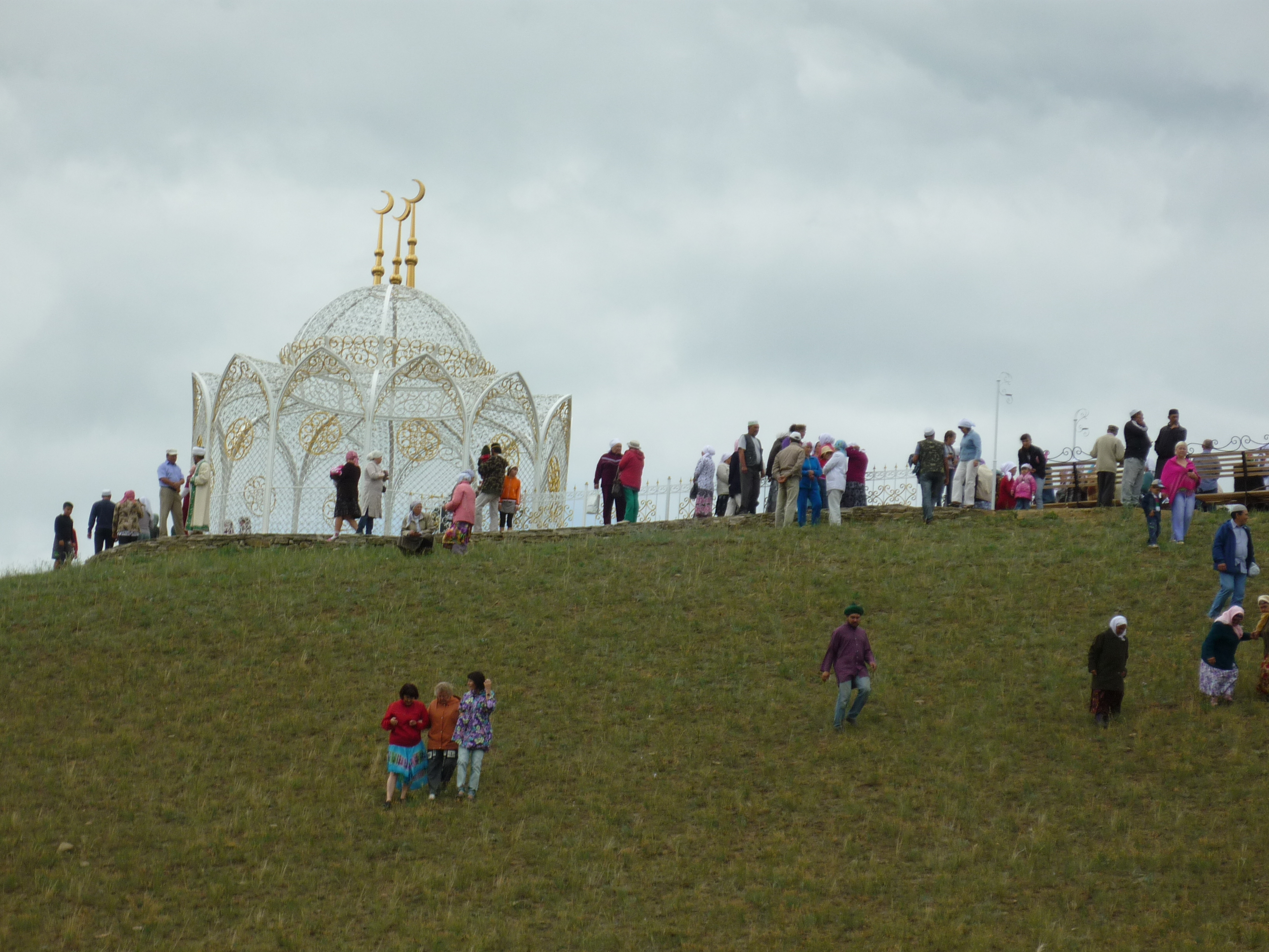 Башҡортса: Башҡортостан Республикаһы .Миәкә районы.Нарыҫтау түбәһендә ике сәхәбә ерләнгән;Зәйет улы Зөбәйер ,Зөбәйер улы Абдрахман.